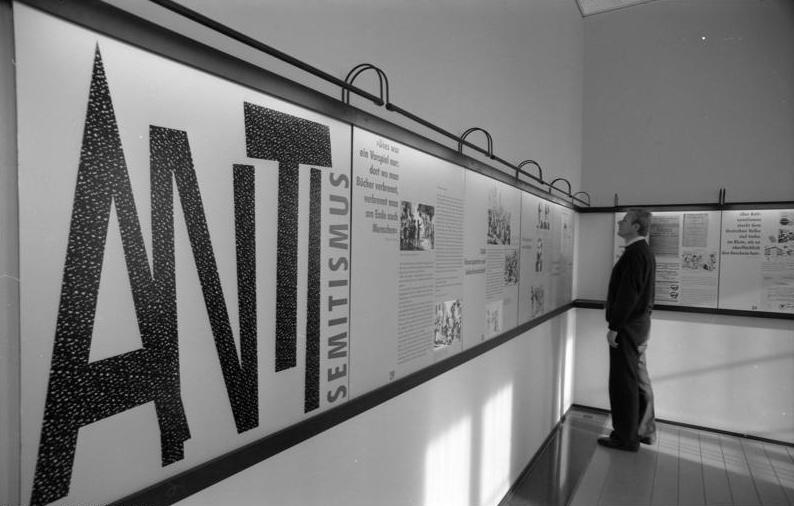 08.11.1988 Das Jüdische Museum im Rothschildpalast am Untermainkai in Frankfurt am Main am Tag der Eröffnung.